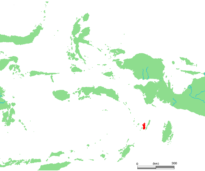 ID Kai Kecil.PNG